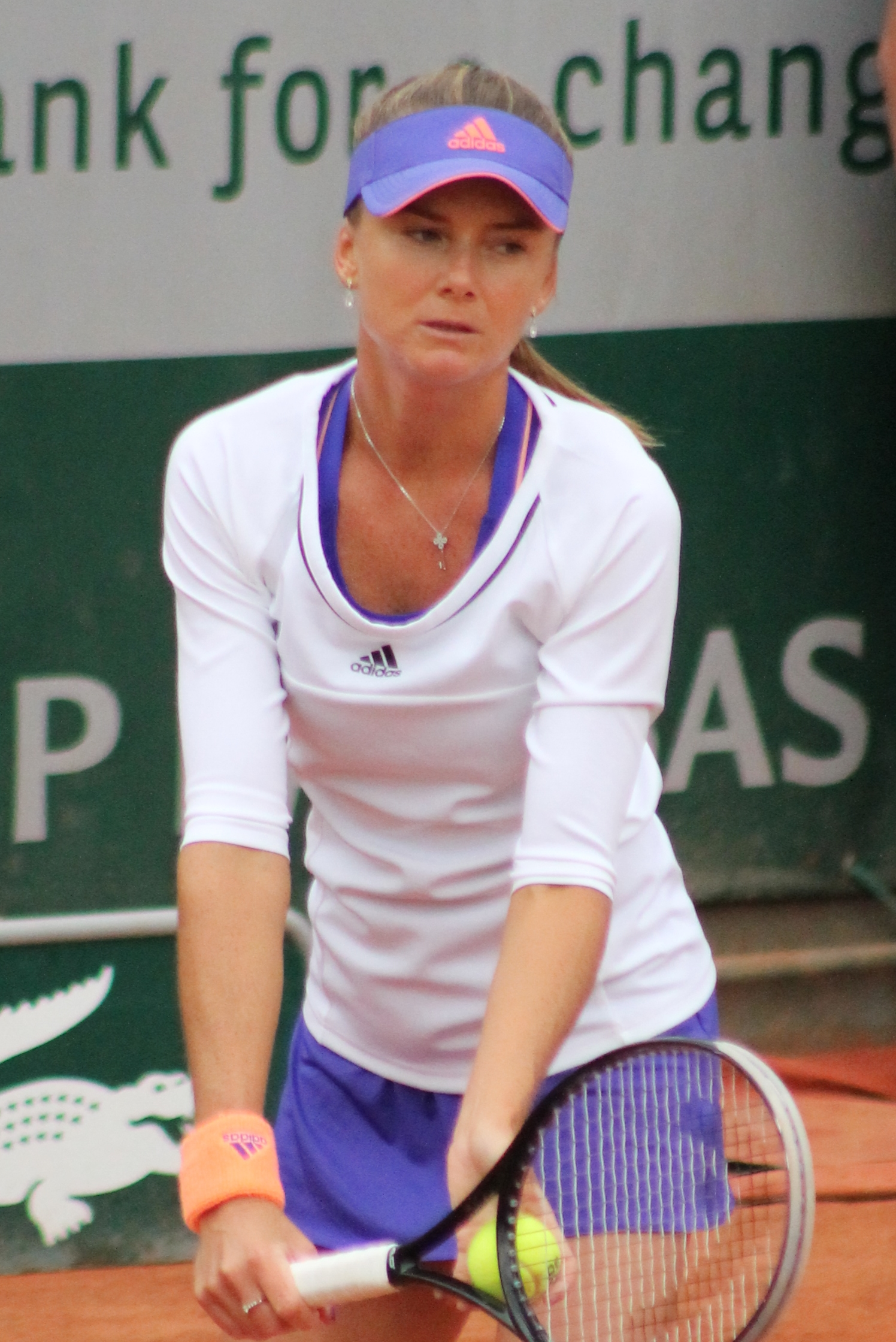 Hantuchova RG15